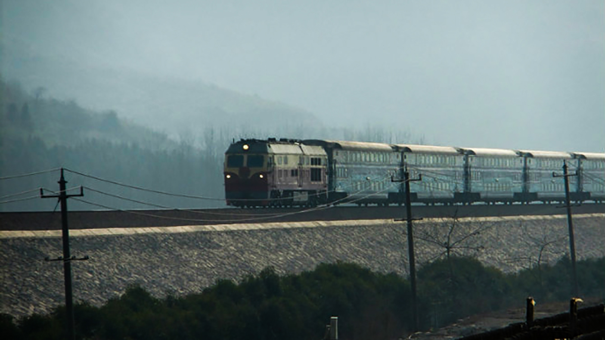 2011年，DF4D牵引池州—南京西T7778次运行于铜九铁路。